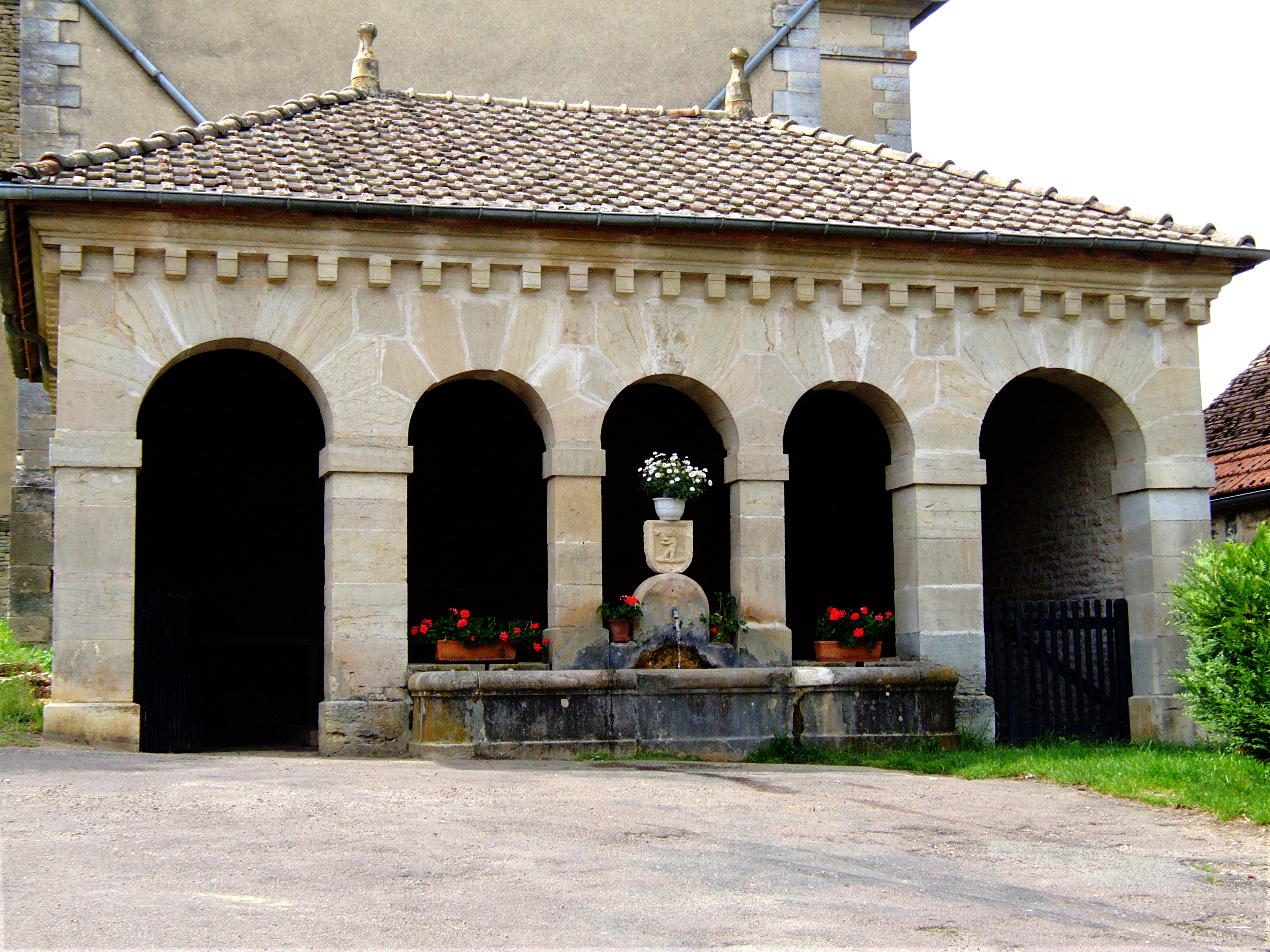 Urcy (Côte-d'Or, France) : Le lavoir